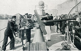 Cañon de 47 mm del Torpedero Nº1